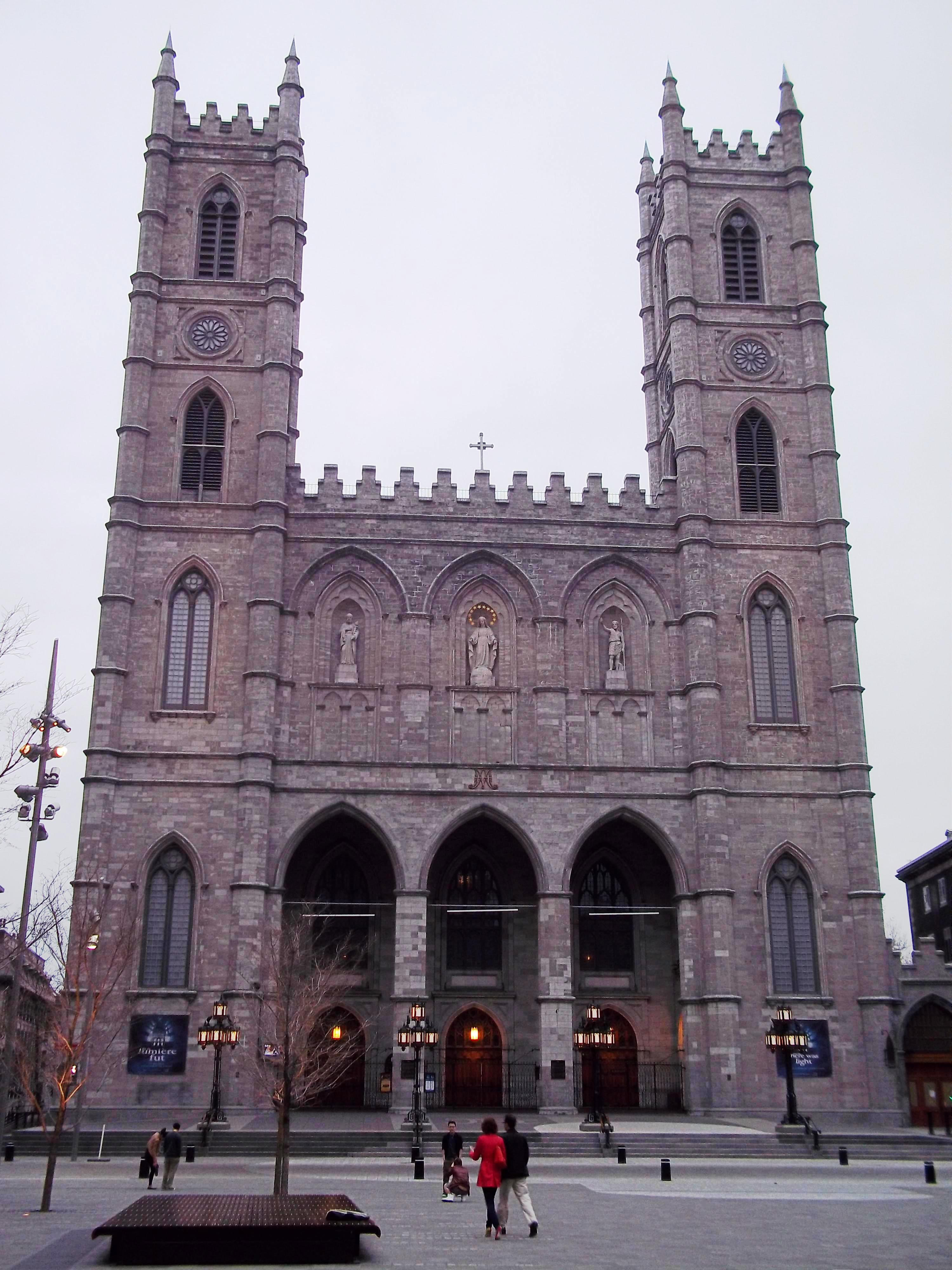 Basilique Notre-Dame de Montréal, Place d'Armes, Vieux-Montréal